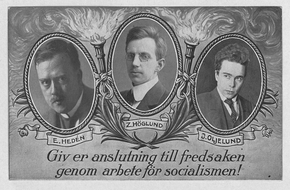 Propagandavykort utgiven av det Socialdemokratiska ungdomsförbundet till stöd för Hedén, Höglund och Oljelund med anledning av förräderiprocessen 1916.